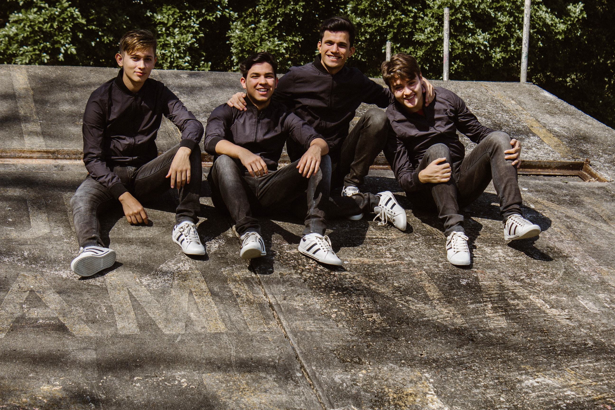 Retz 2017